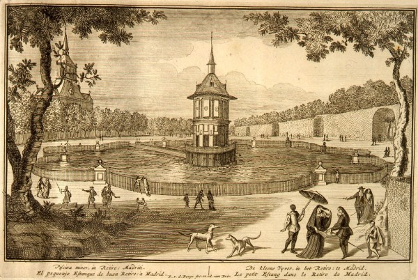 "El estanque pequeño del Retiro. Madrid". Grabado de Pieter Van den Berge (1701). Pertenece a la colección del Museo de Historia de Madrid. En la leyenda figura el siguiente texto: "Piscina minor, in Retiro; Madriti. De kleene Vyver, in het Retir; te Madrid. / El pequenjo estanque de buen Retiro; à Madrid. Le petit Estang dans le Retiro de Madrid"